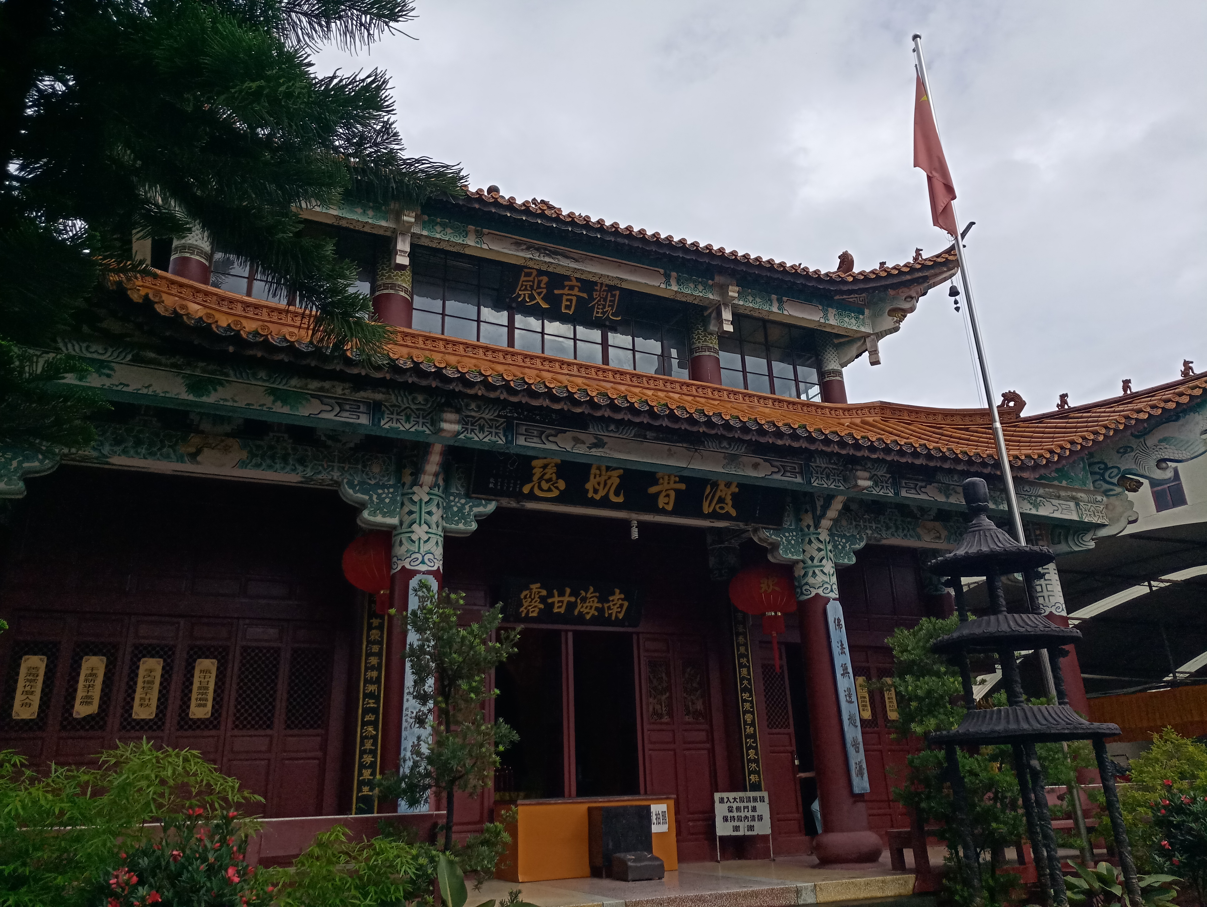 芒市观音寺